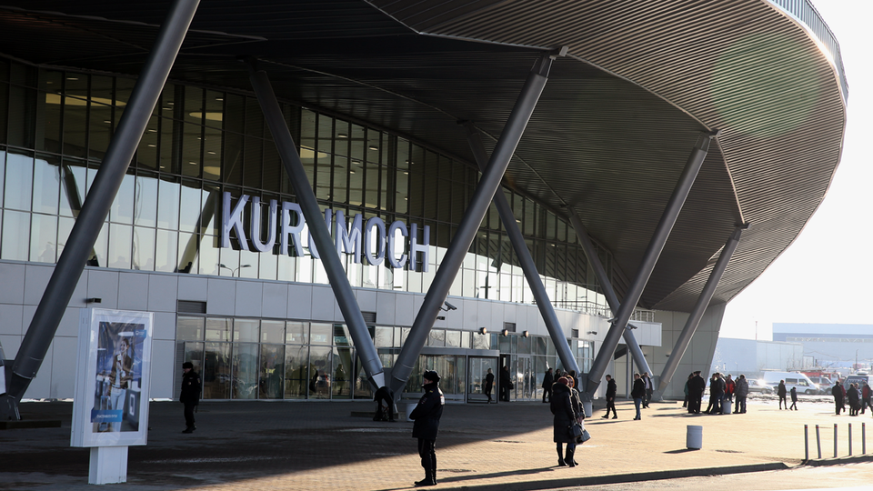 Новый терминал аэропорта Курумоч